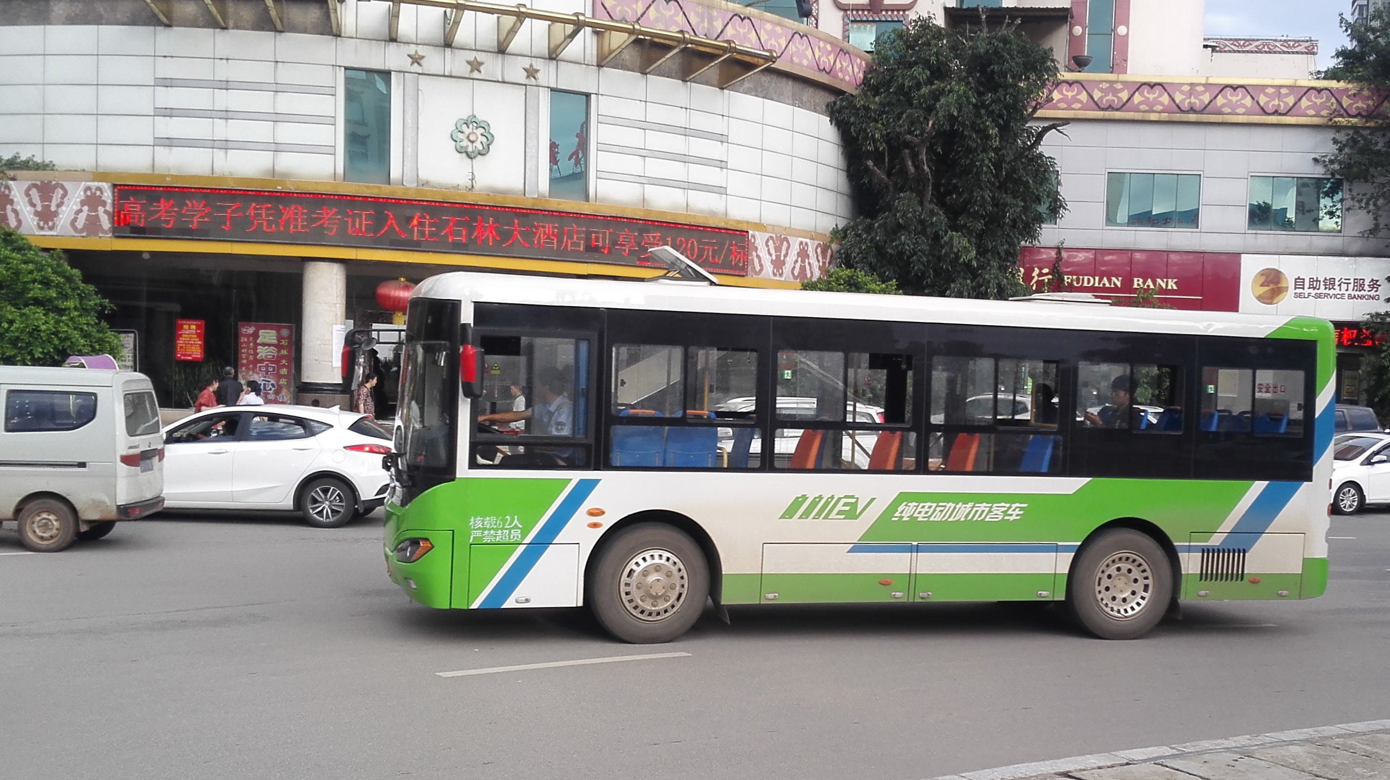 石林县的一辆公交车